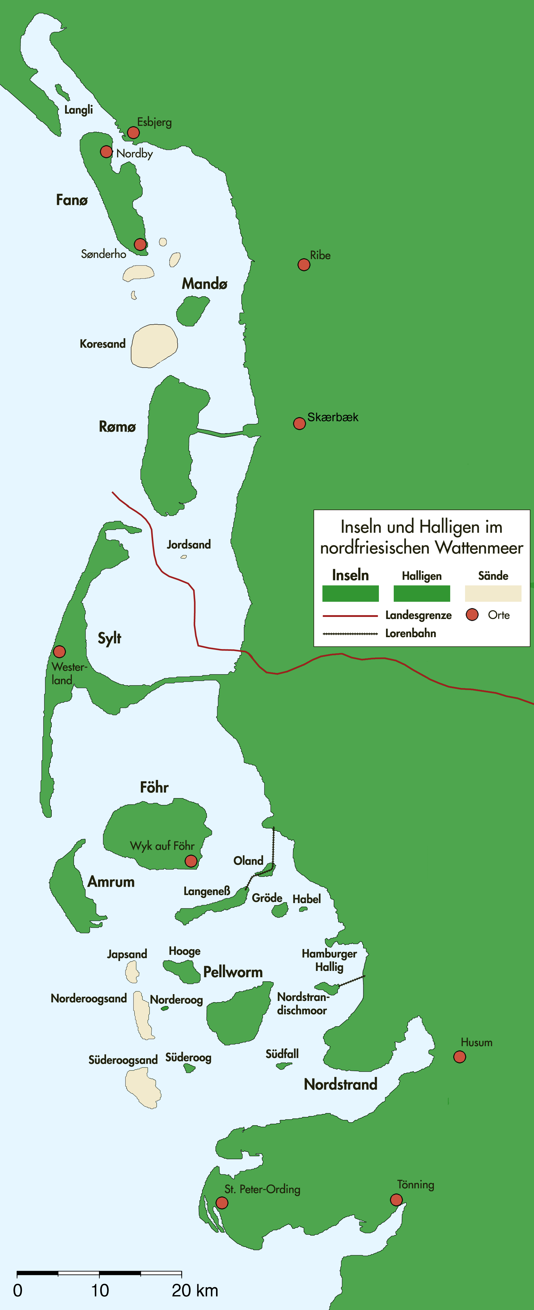 Nordfriesisches Wattenmeer, Nordfriesische Inseln (Inseln, Halligen und Sande) North Frisian Islands (Islands - deep green, Halligs - middle green, sand banks - yellow)